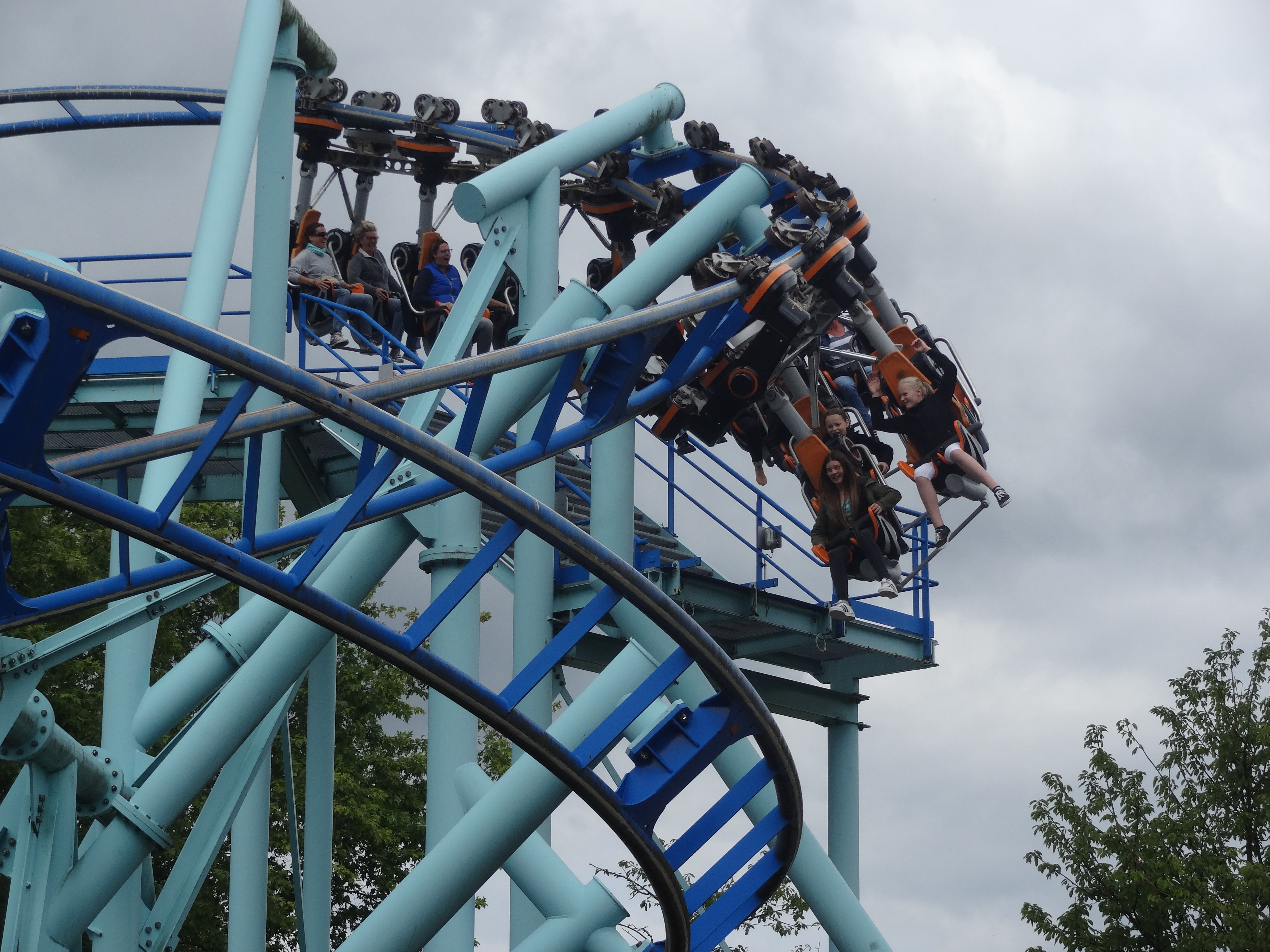 Montagnes russes Jimmy Neutron's Atomic Flyer à Movie Park Germany